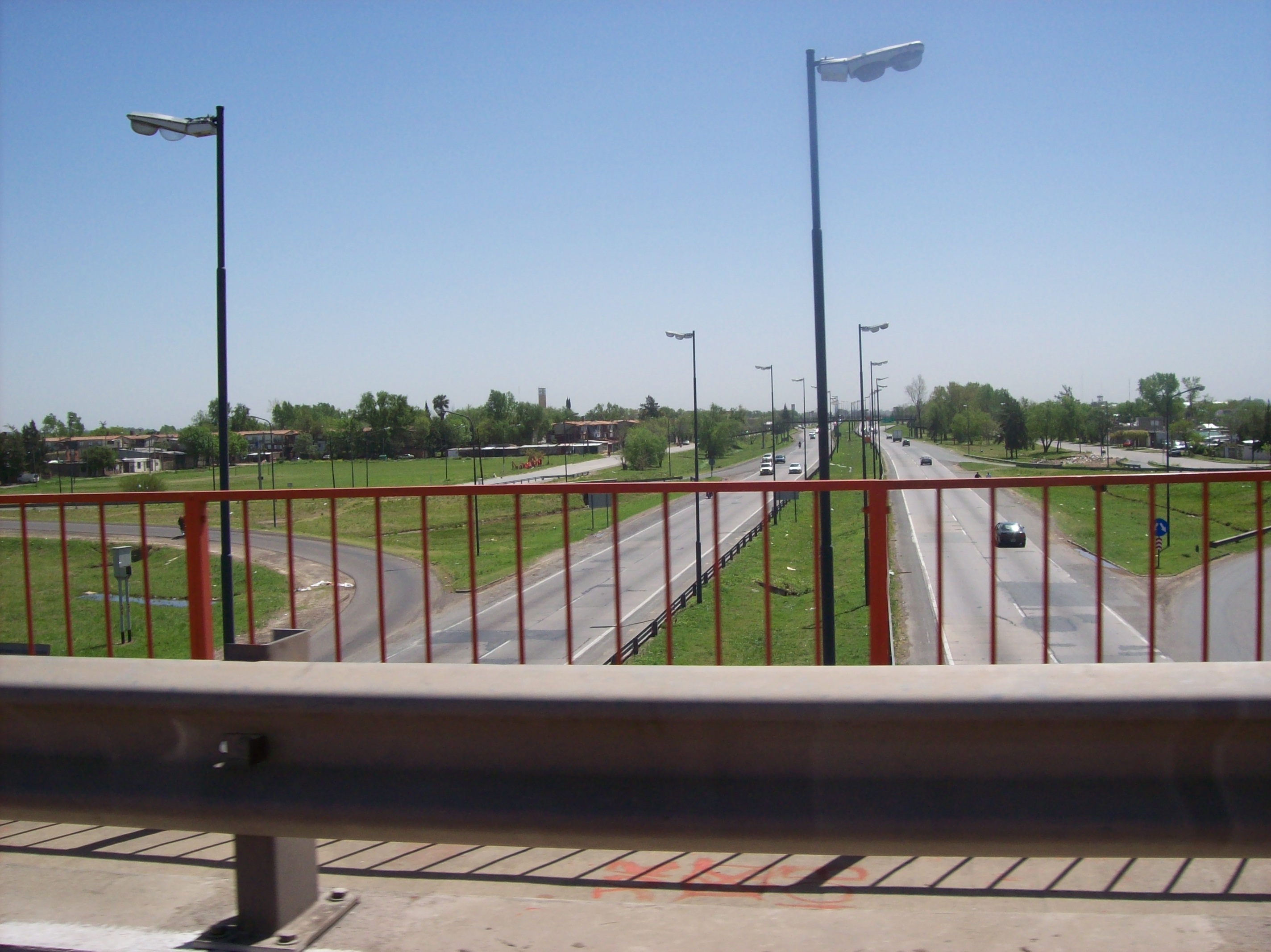 Ruta Nacional A008 (Avenida de Circunvalación de Rosario) desde la Autopista Rosario - Córdoba en Rosario, Provincia de Santa Fe, Argentina.